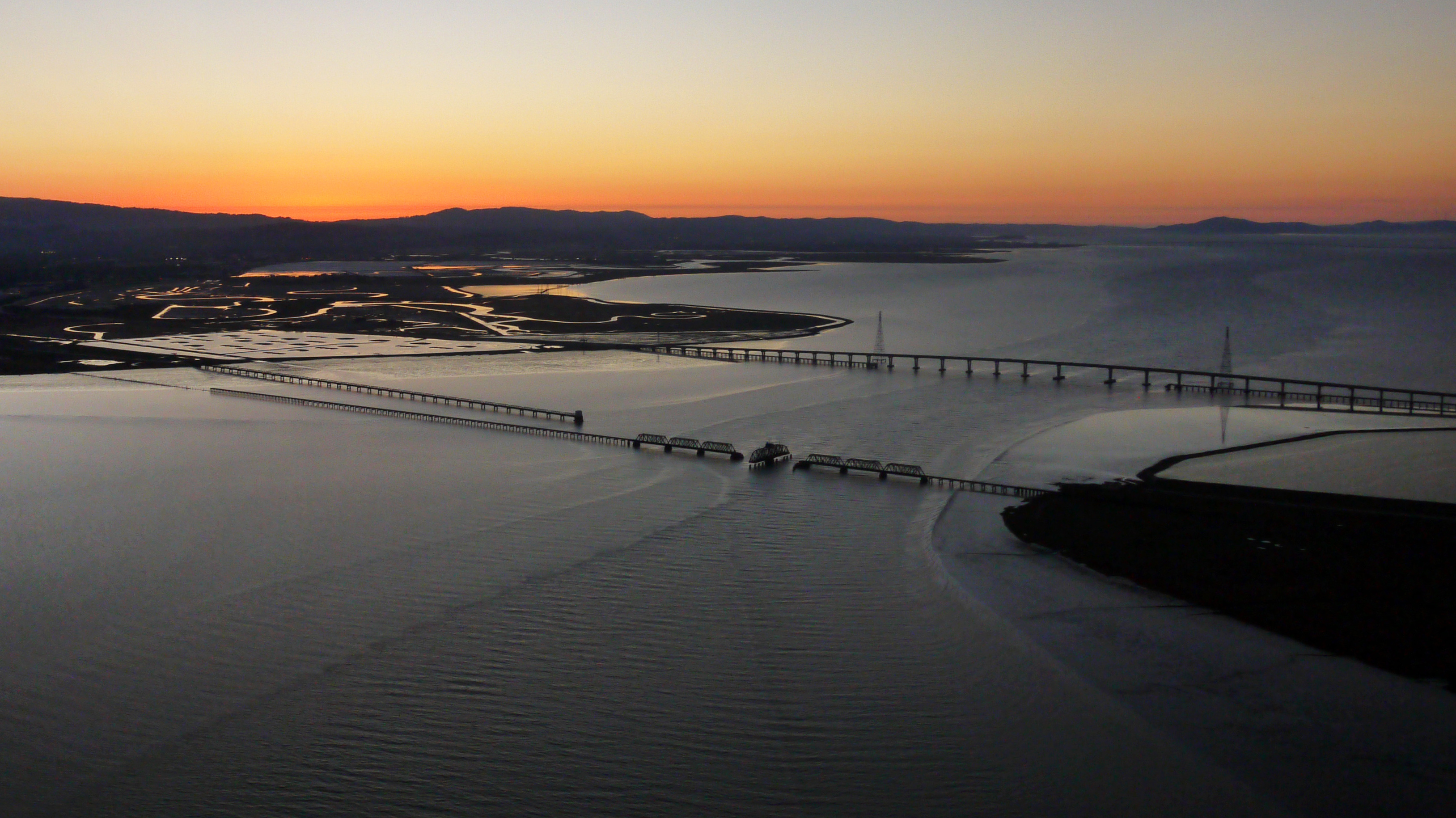 zeppelin-ride-020100925-267